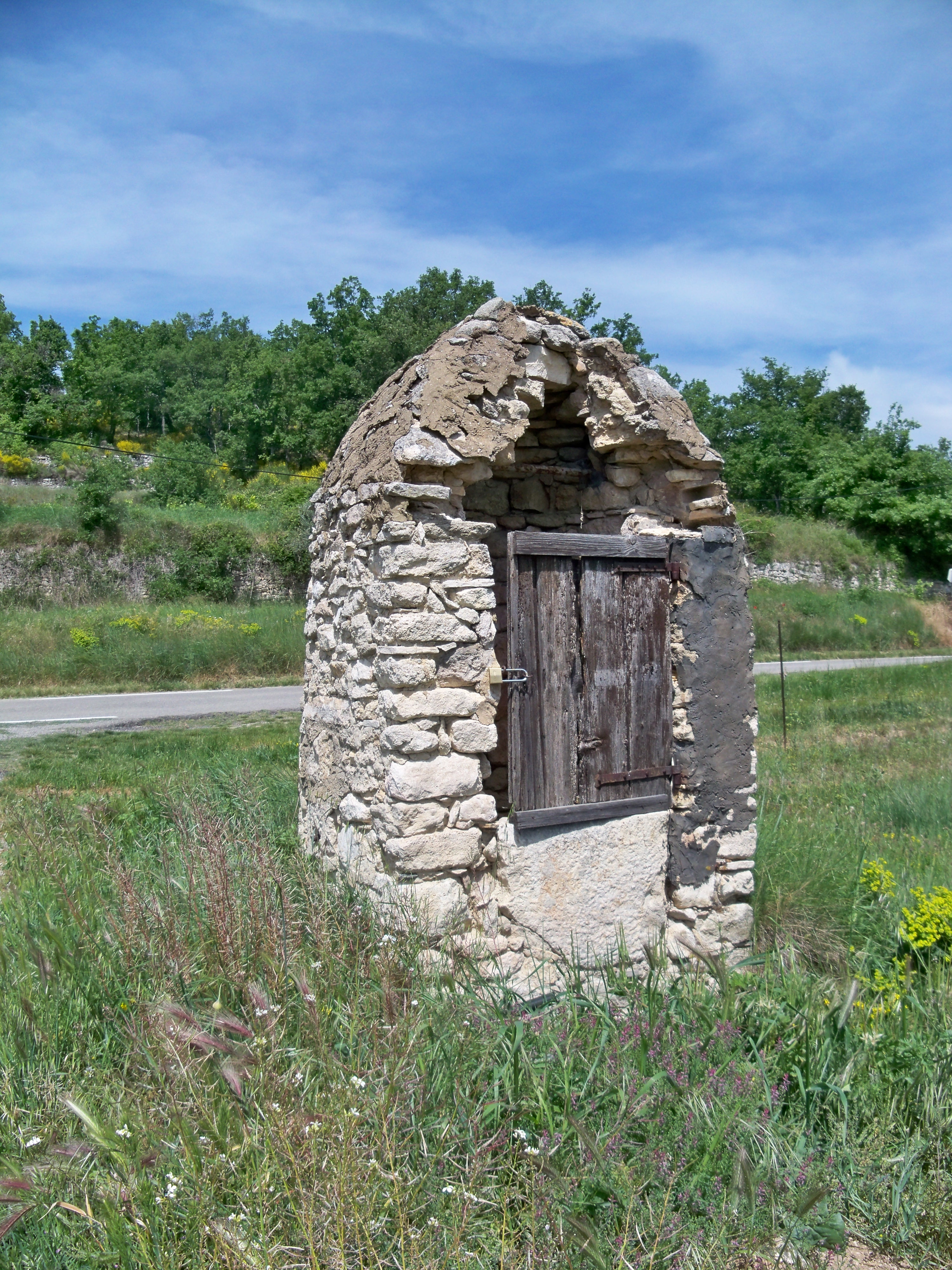 Puis Couvert près de Saint Martin de Castillon, Vaucluse, France